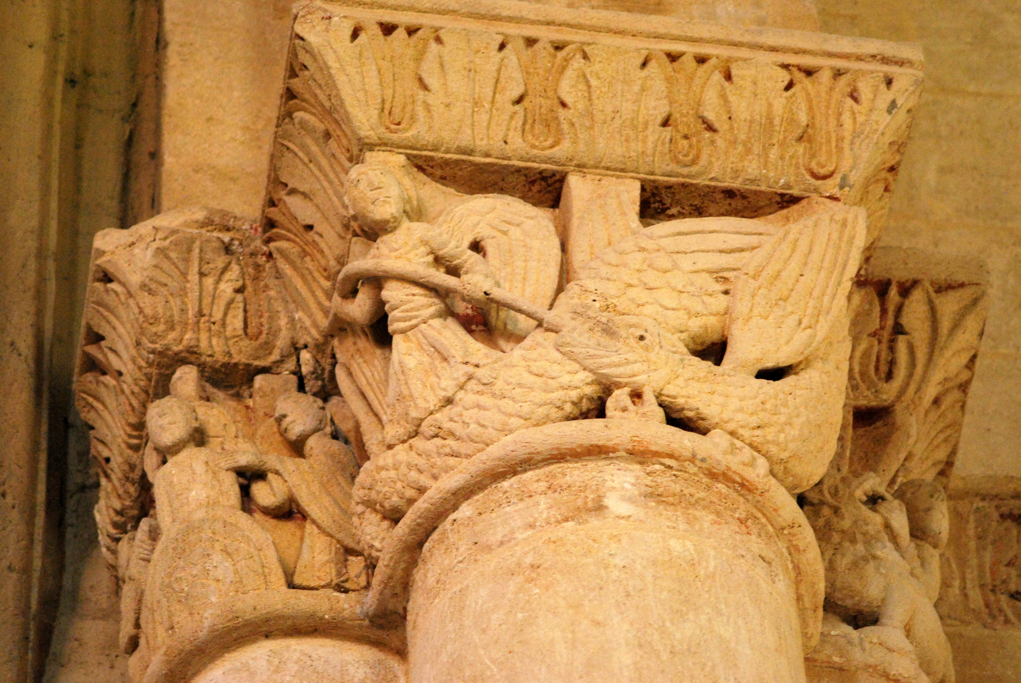 Église Saint-Quentin de Baron (Gironde)